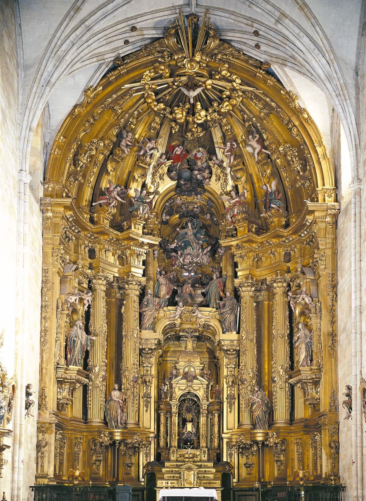 Andra Mari Jasokundearen euskal gotiko garaiko eleizako erretaula. Monumentu historiko artistiko izendatua. Segura, Gipuzkoa, Euskadi, España